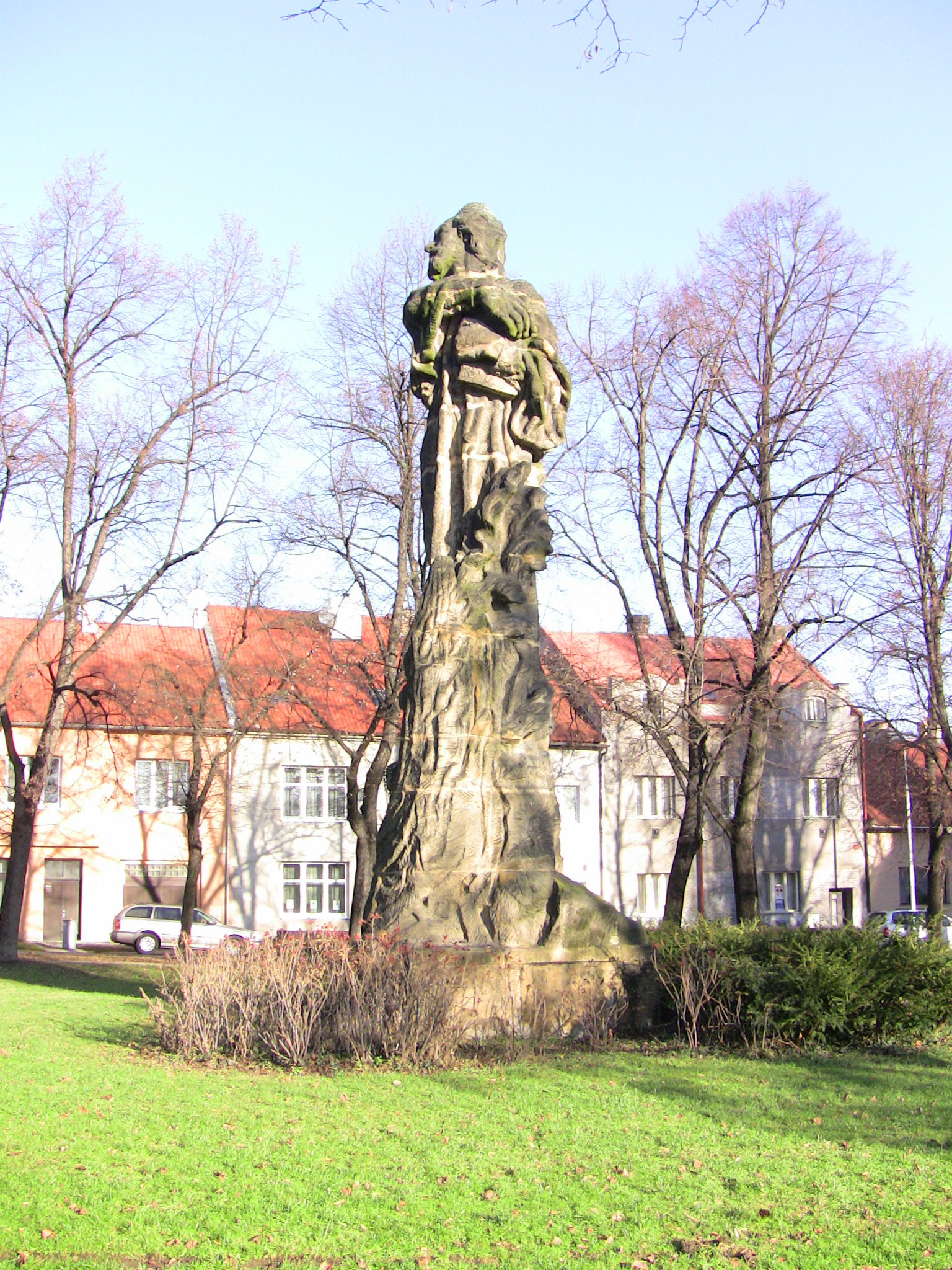 Pomník Mistra Jana Husa (Kolín), Husovo nám., Kolín